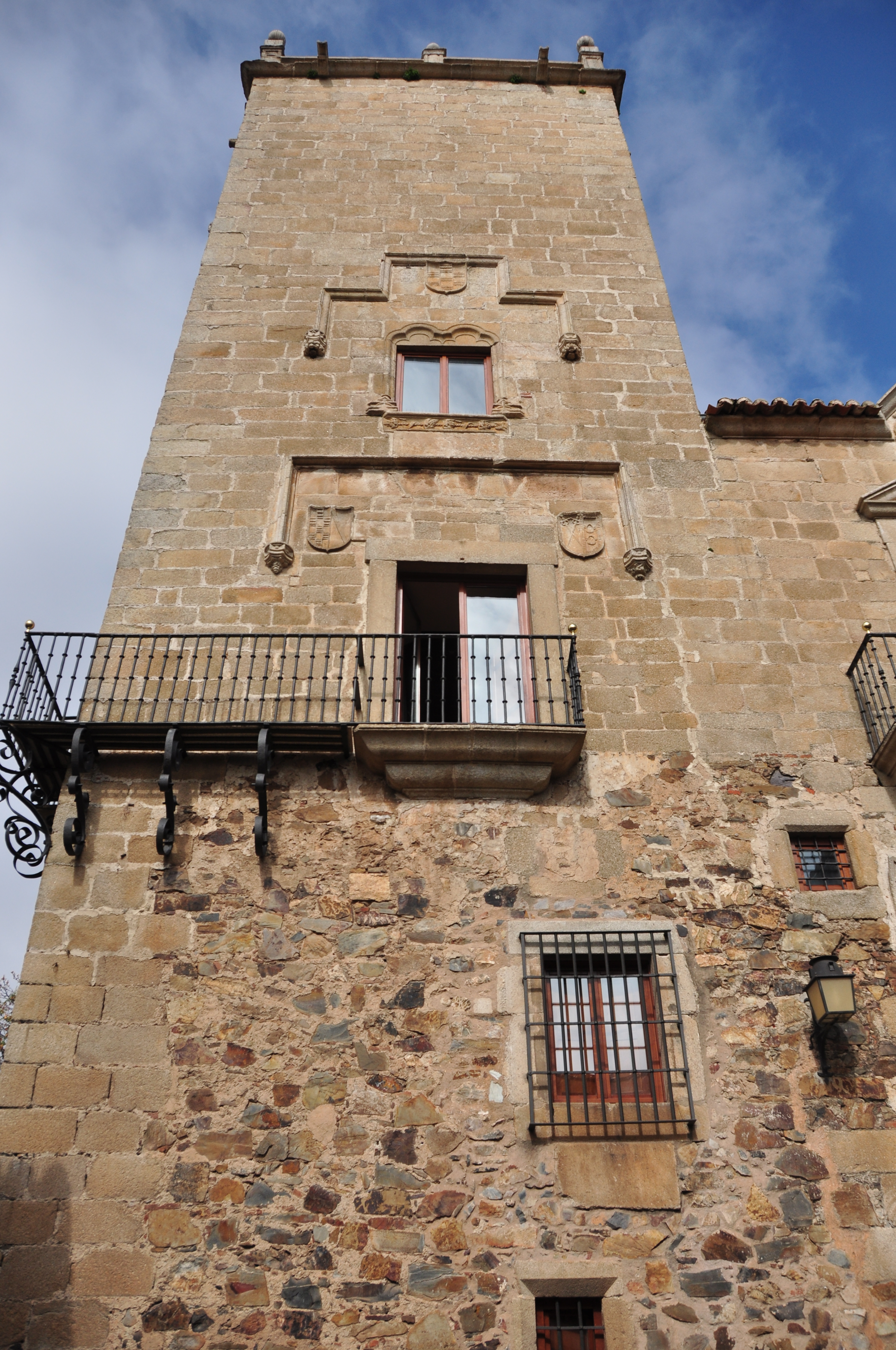 Torre del Palacio del Comendador de Alcuéscar de Cáceres, actualmente Parador de Turismo.